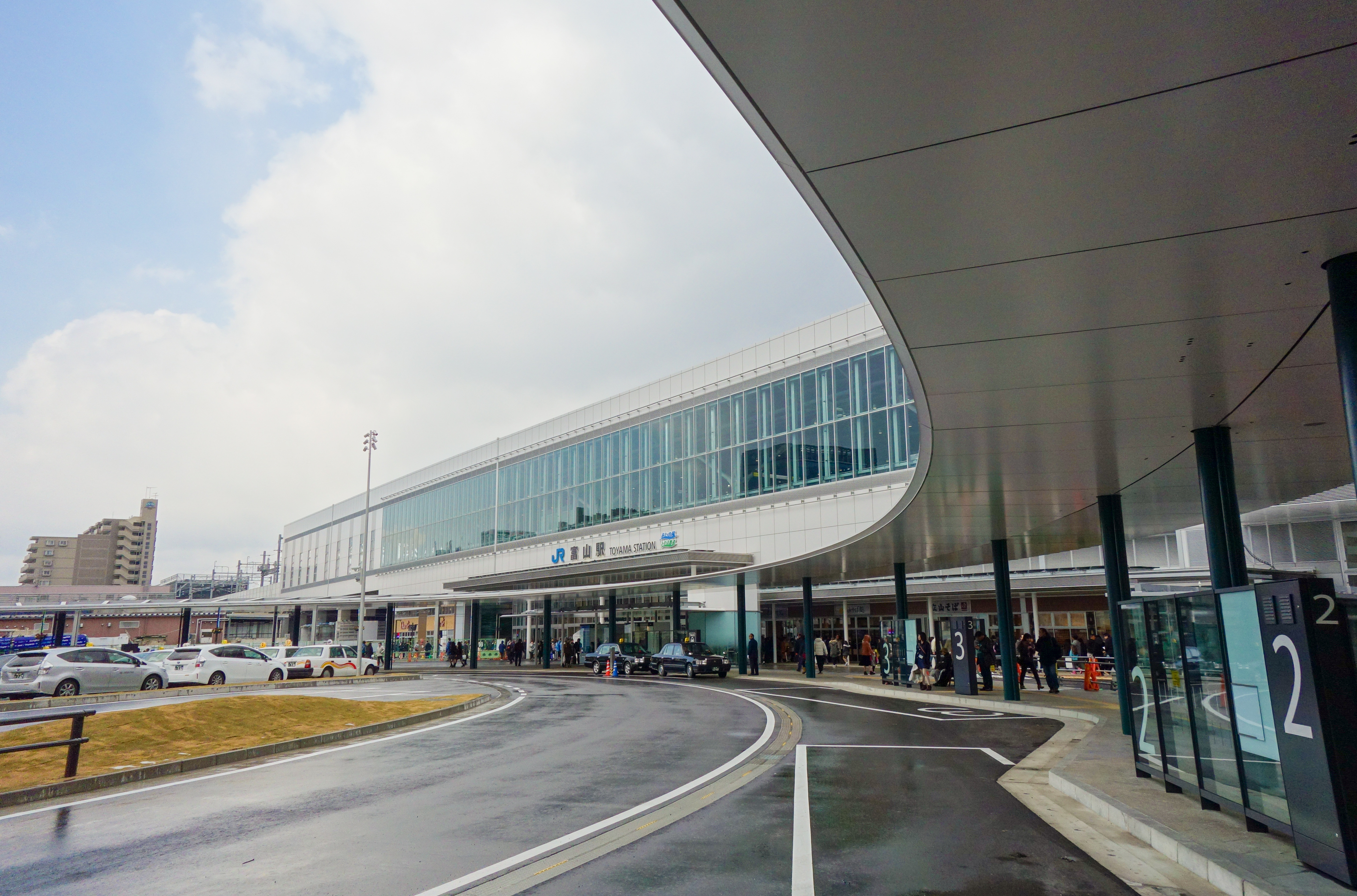 富山駅（JR西日本・あいの風とやま鉄道） （2015年3月14日撮影）